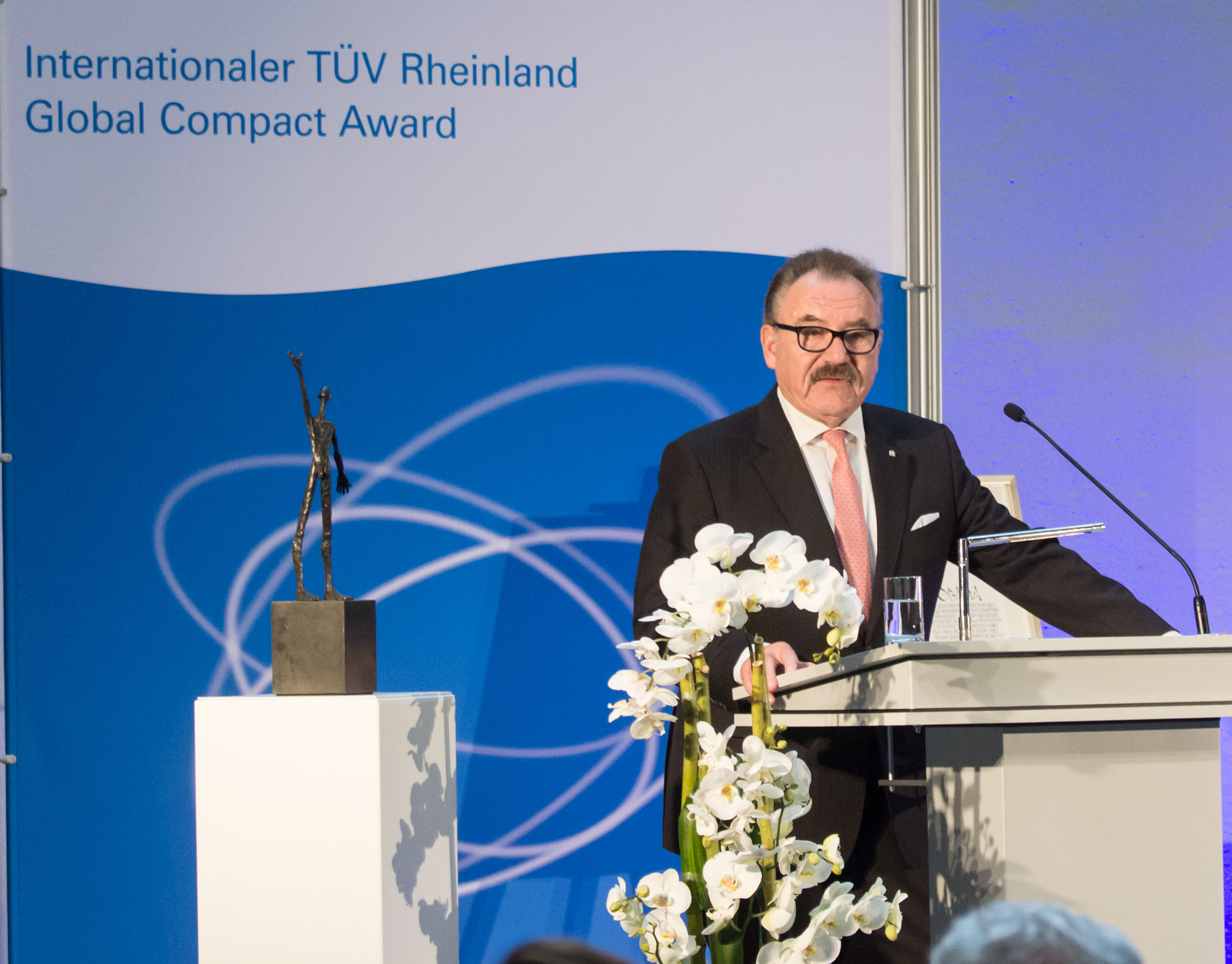 Dr. Auma Obama wird in der Piazzetta des Kölner Rathauses für Engagement für Entwicklungszusammenarbeit mit dem Internationalen TÜV Rheinland Global Compact Award geehrt. Ansprache Prof. Dr.-Ing. Bruno O. Braun, Vorsitzender des Vorstands der TÜV Rheinland Stiftung